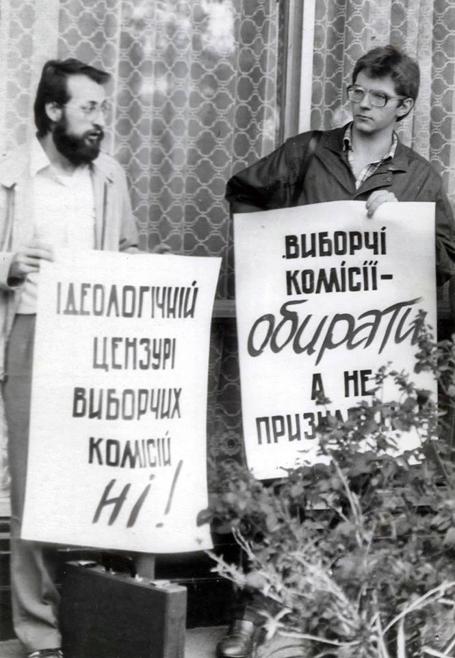 Одарич - член Народного руху